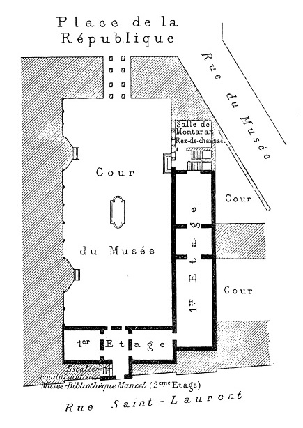 Plan du musée des Beaux-Arts de Caen installé dans l'ancien séminaire des Eudistes en 1809 et agrandi en 1861.